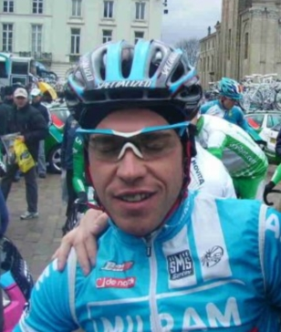 Carlo Scognamiglio aan de start van de Omloop Het Volk 2008.